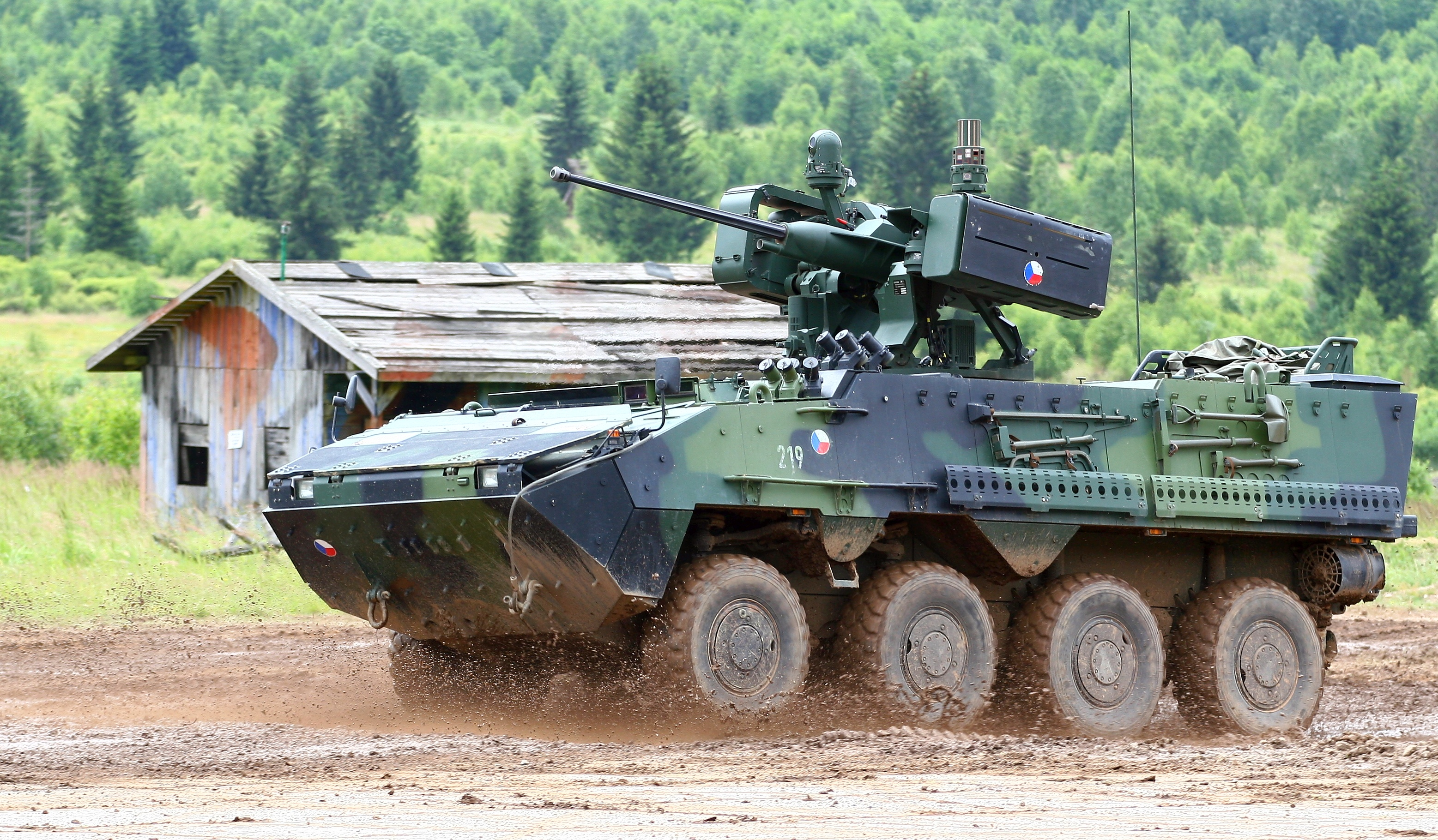 Vojenská technika zaznamenaná při dynamických ukázkách na Dni pozemního vojska BAHNA 2018, který pořádá Velitel společných sil a Nadace pozemního vojska AČR.